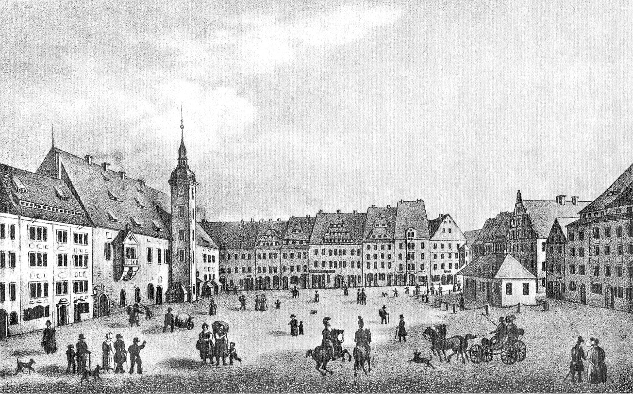 Historische Ansicht von Freiberg in Sachsen. Stahlstich.